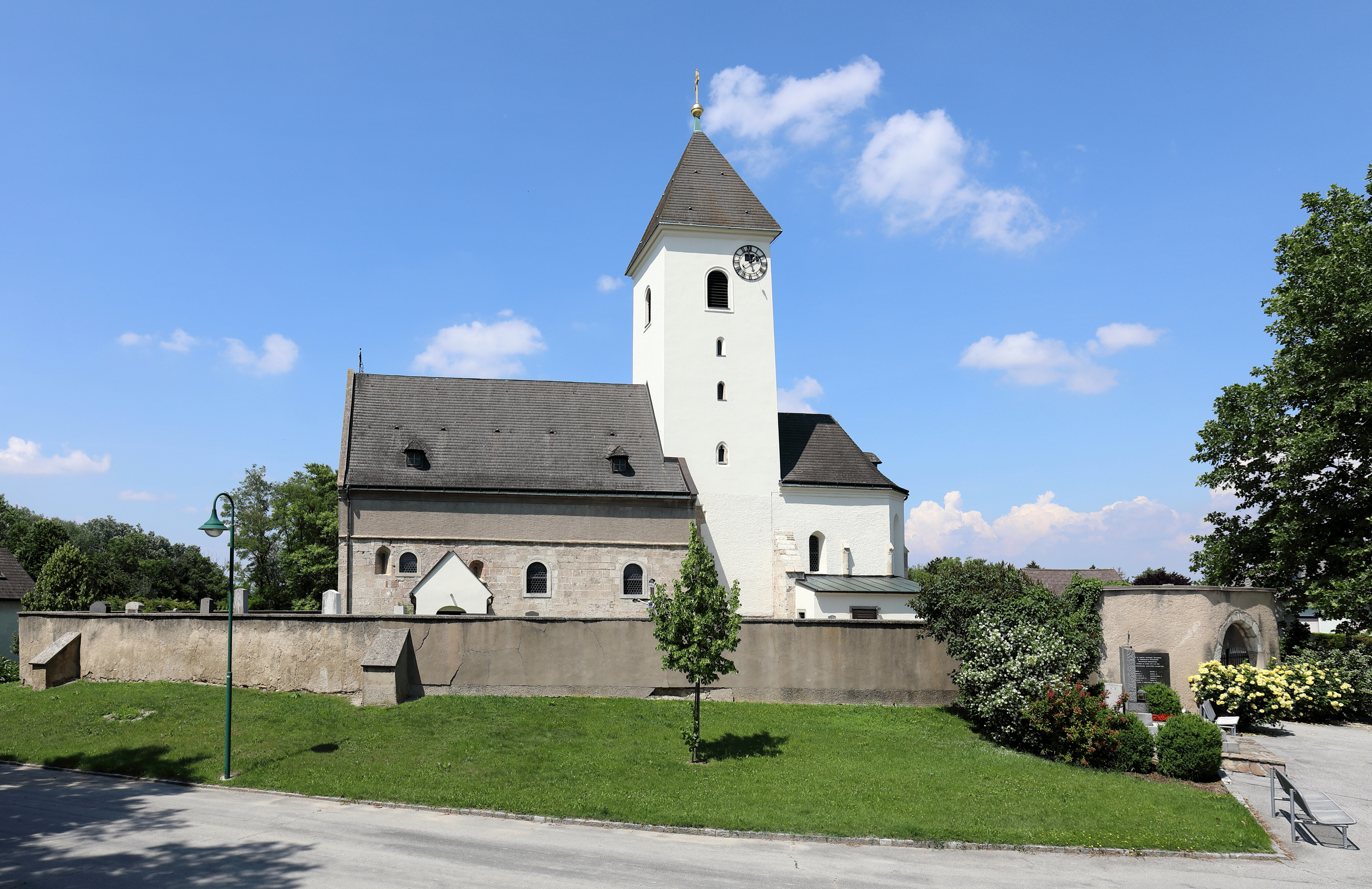 Südansicht der röm.-kath. Pfarrkirche hl. Martin in Witzelsdorf, ein Dorf in der niederösterreichischen Marktgemeinde Eckartsau. Eine spätromanische/frühgotische ehemalige Wehrkirche, die in der Barockzeit umgebaut wurde.